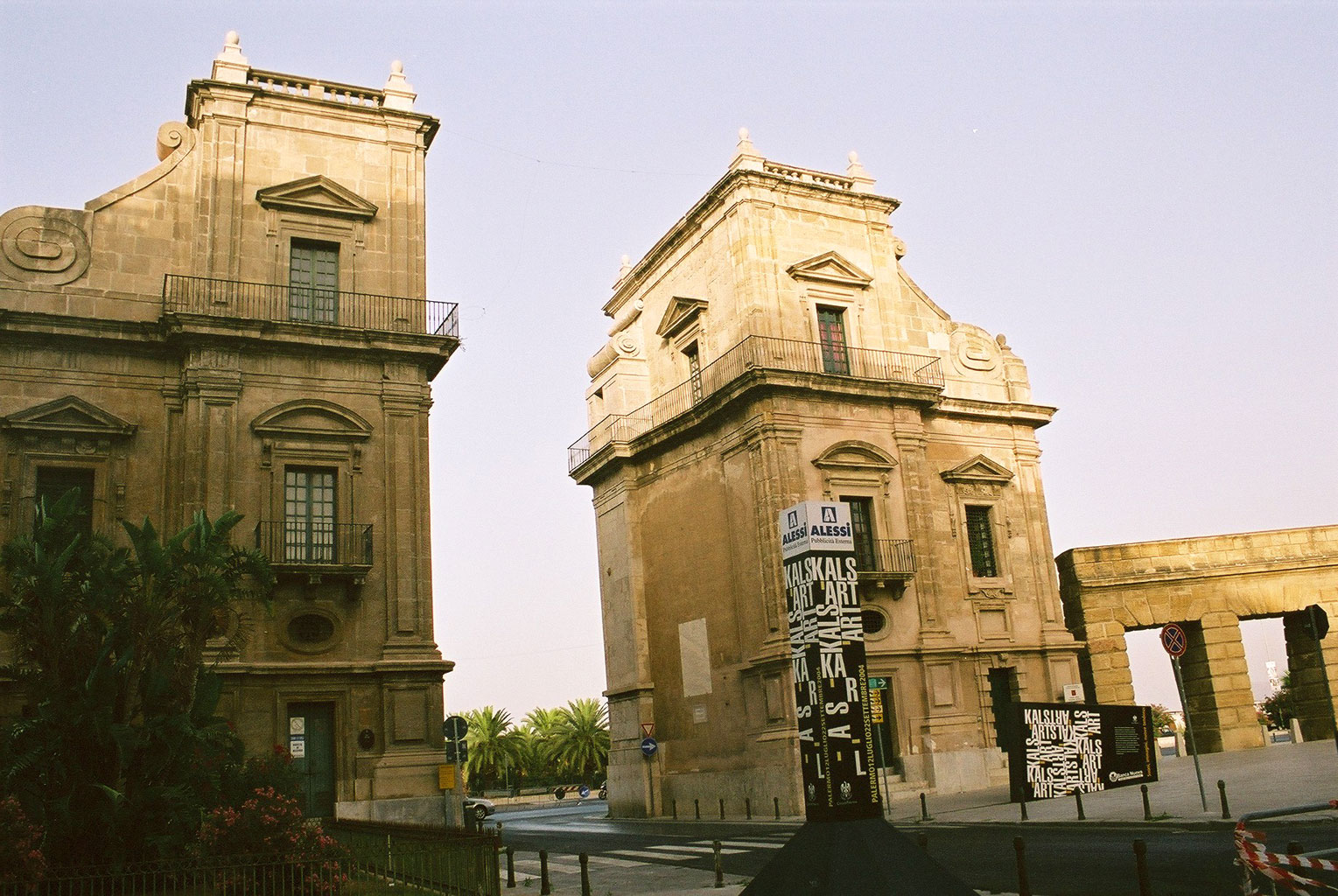 Porta Felice, Palermo.